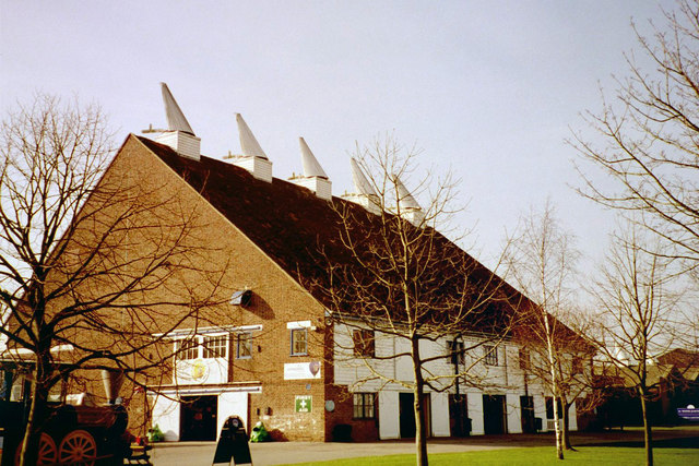 Bell 5, Beltring Hop Farm, Beltring, Kent